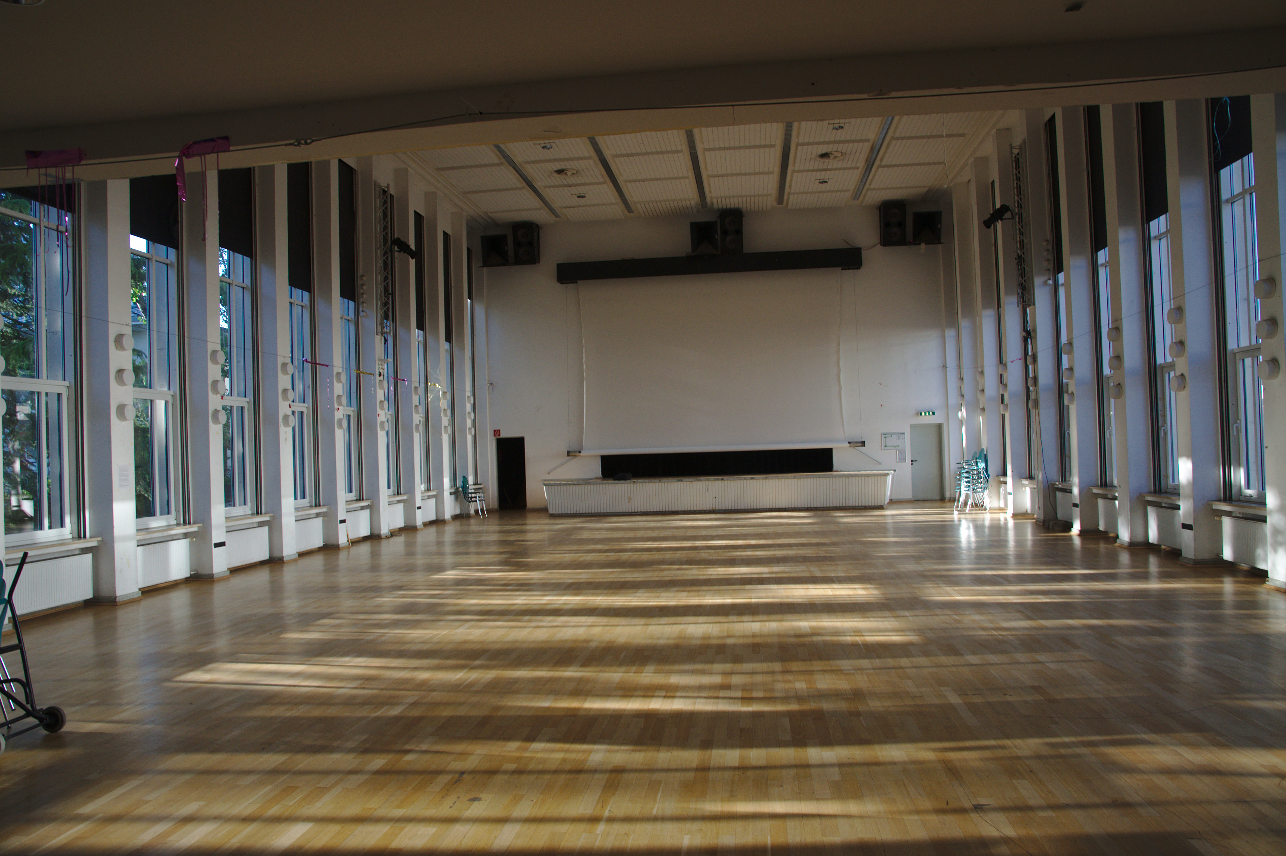 Innenansicht des Festsaales im Studierendenhaus, Frankfurt am Main